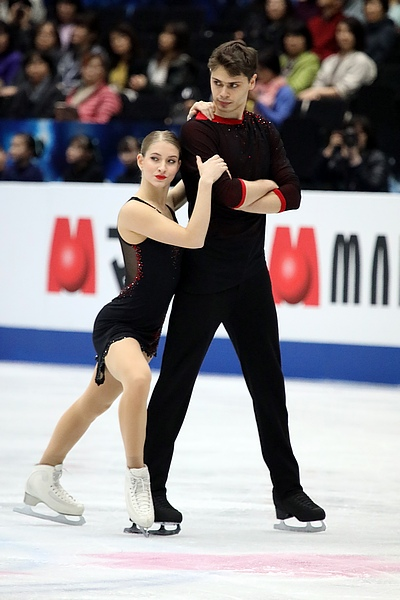 Minerva Fabienne Hase and Nolan Seegert at the 2019 World Championships - FS